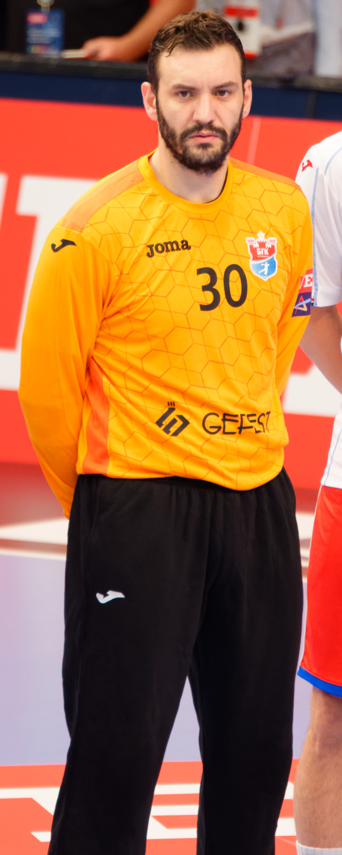 Rencontre de phase de groupe de la ligue des champions 2017/18 entre le PSG et Meshkov Brest A Coubertin le 24 septembre 2017.